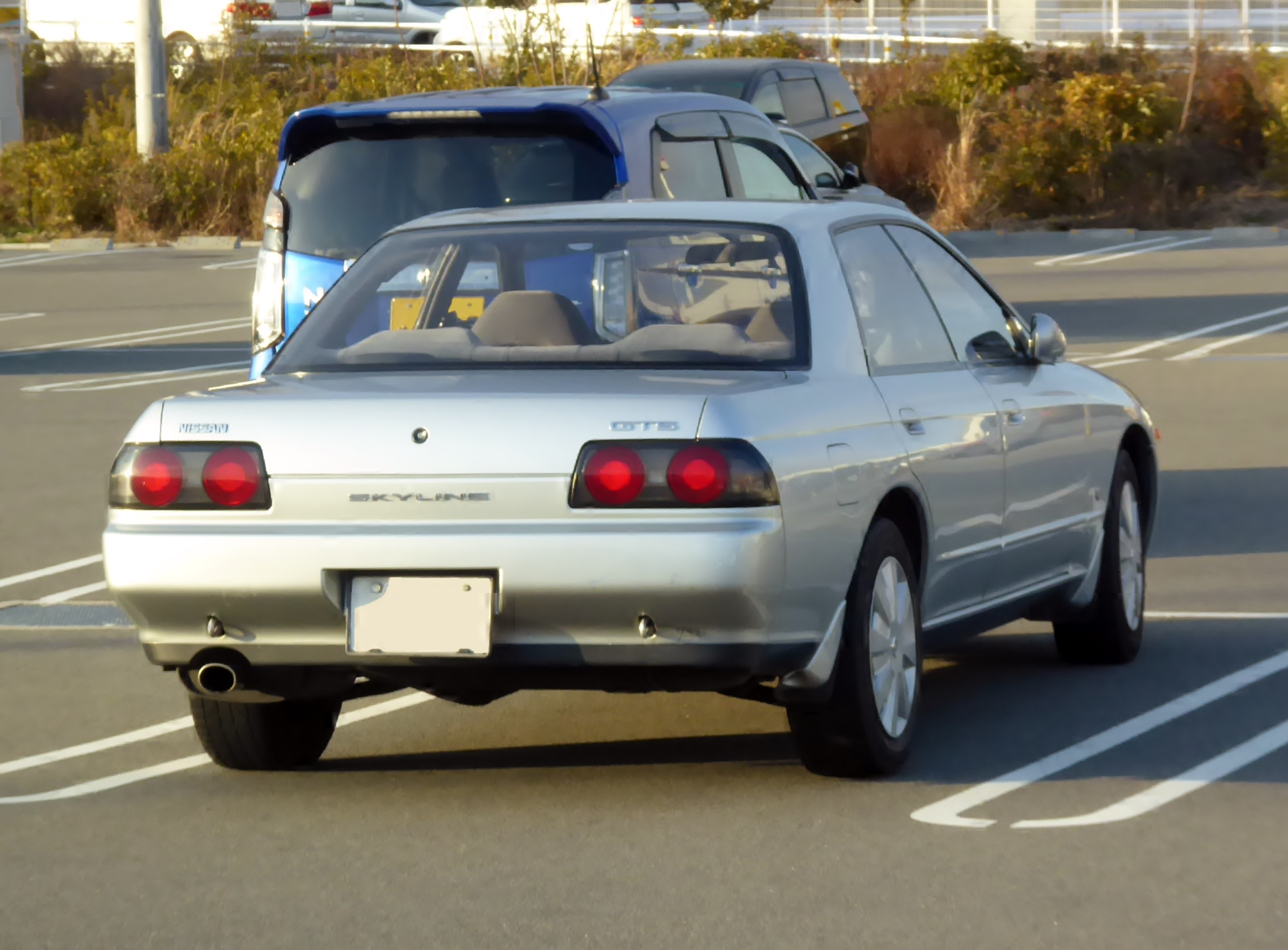 E-HR32型日産・スカイライン4ドアGTSをリアから撮影。